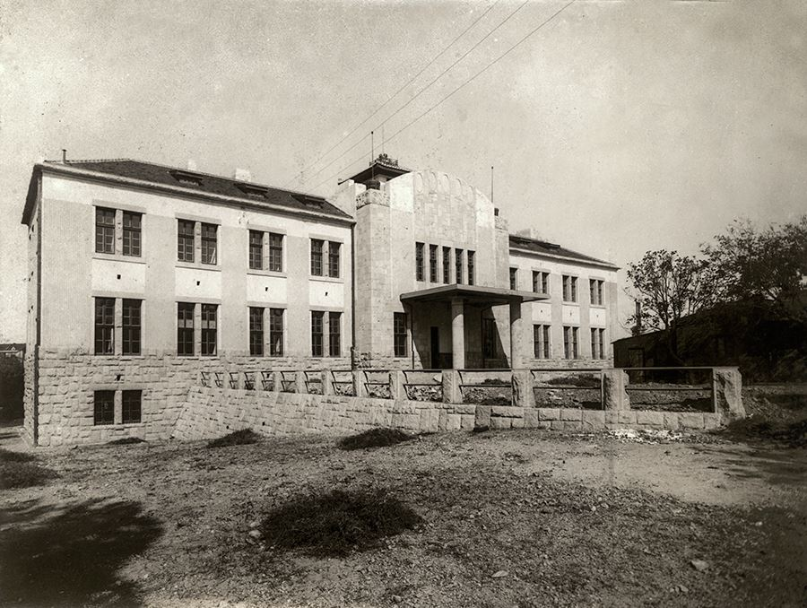 青岛普济医院